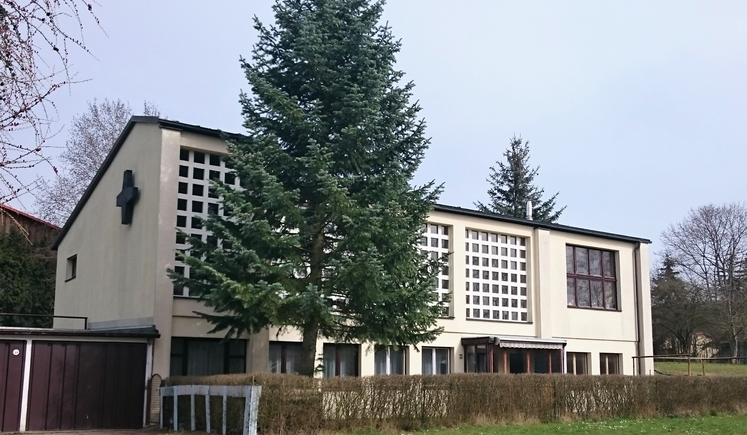 Kirche Zum heiligen Kreuz in Meiningen, erbaut 1979.